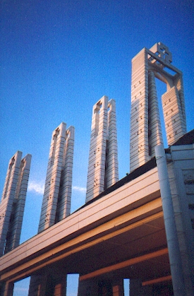 Elektrenai, St. Marien Königin der Märtyrer (Original text: Elektrenai, St. Marien Königin der Märtyrer) Fotograf / Zeichner: Benutzer:Gintara Andere Versionen: ?